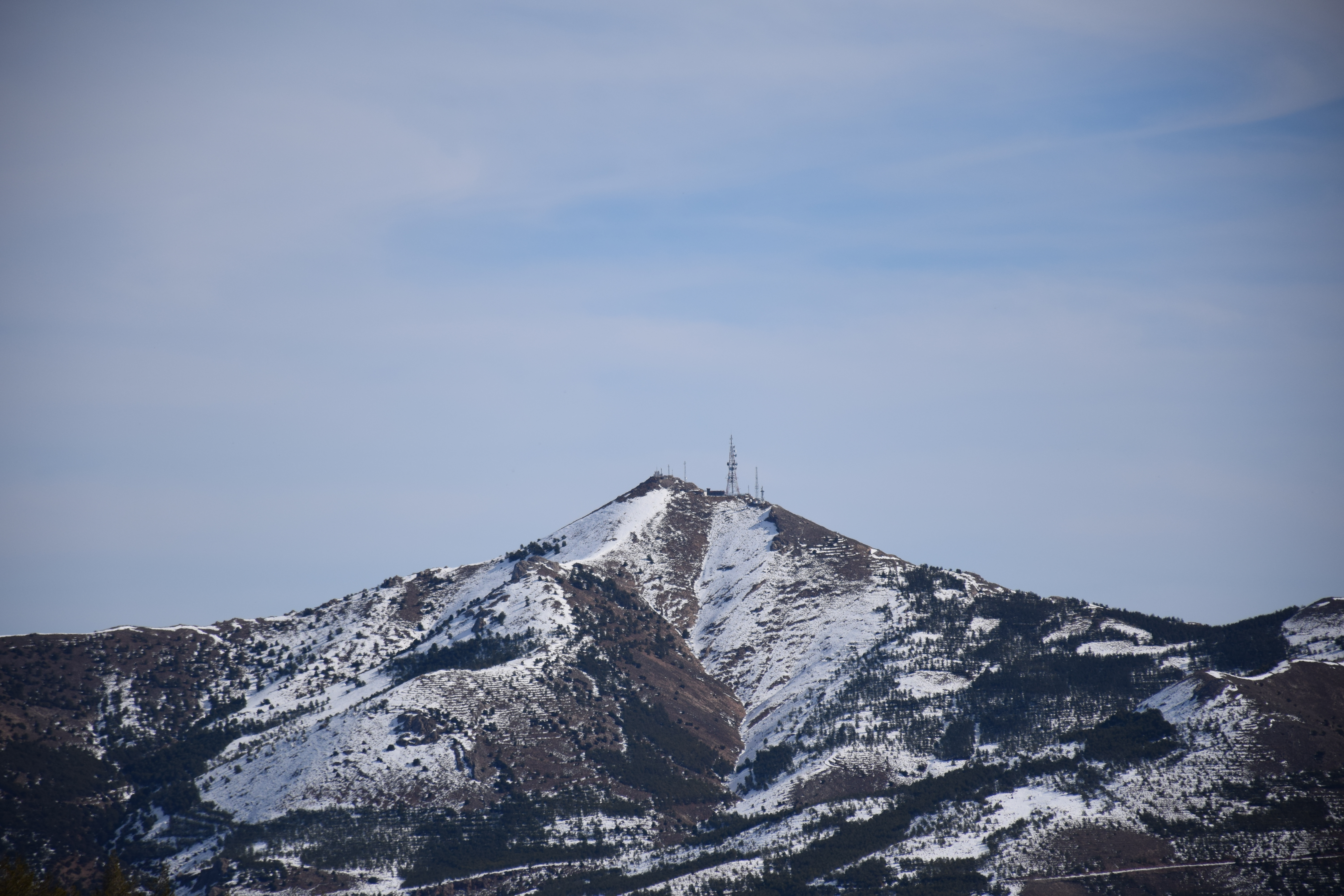 Tetica de Bacares vista desde el sur, concretamente desde la umbría del Calar Alto, a la altura del Refugio del Conde